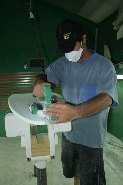 Toy shaper au travail, auteur de la photo Kami